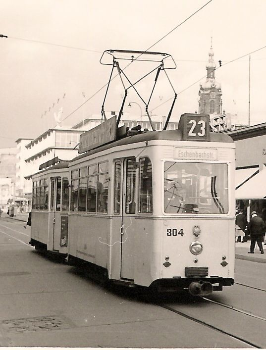 Mannheimer Straßenbahnwagen 304 (Nachkriegsbauart), Aufnahme-Ort: Mannheim "Breite Straße", Höhe Quadrat N 1, Blickrichtung Paradeplatz